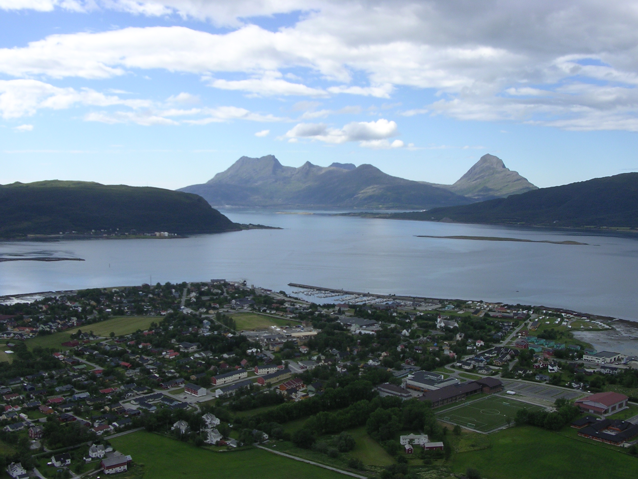 Utsikt mot tettstedet Nesna med øyene (fra venstre ) Hugla, Tomma og Handnesøya i bakgrunnen